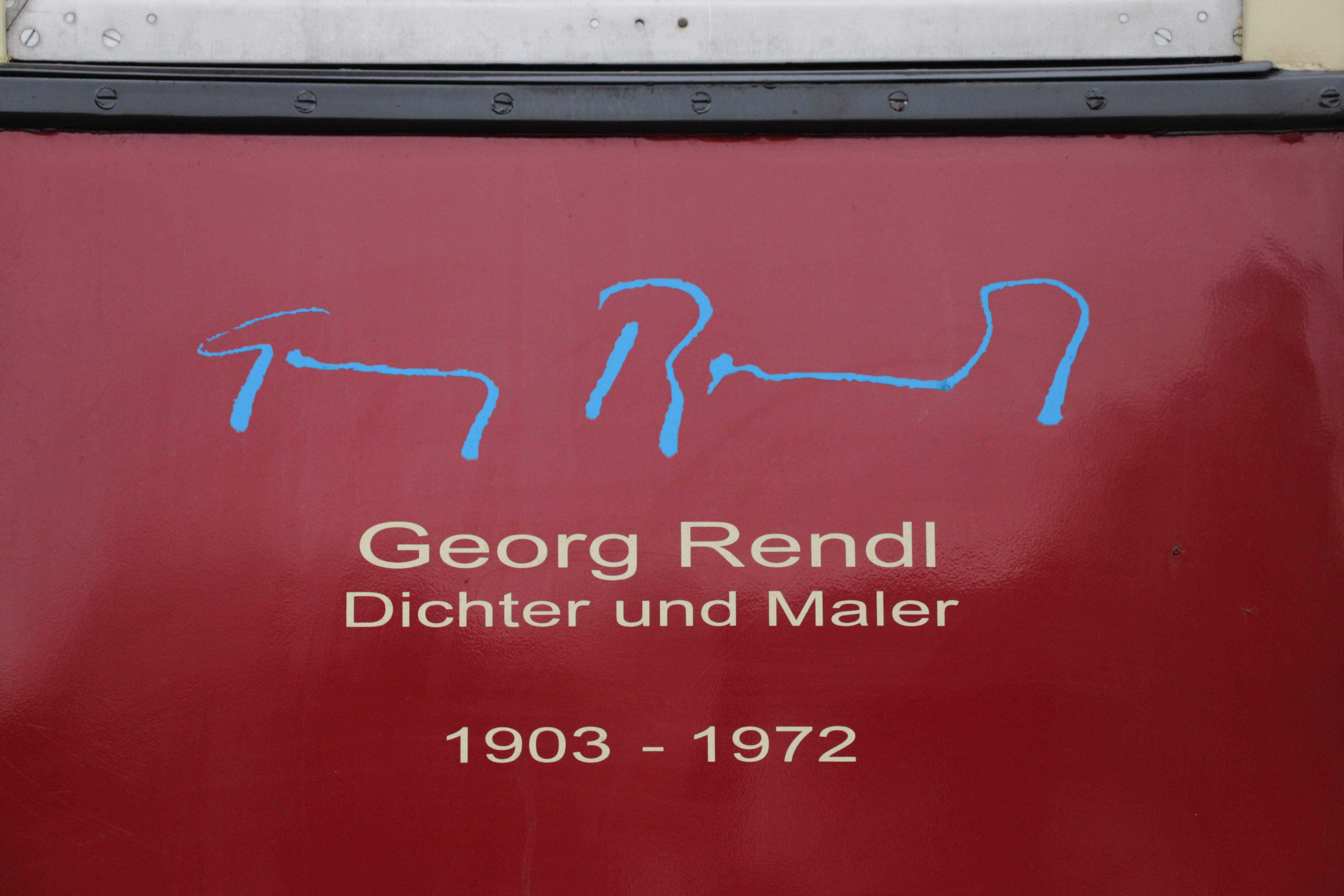 Unterschrift und Lebensdaten des Salzburger Schriftstellers Georg Rendl als Aufschrift auf einem Waggon einer historischen Zuggarnitur der Salzburger Lokalbahn